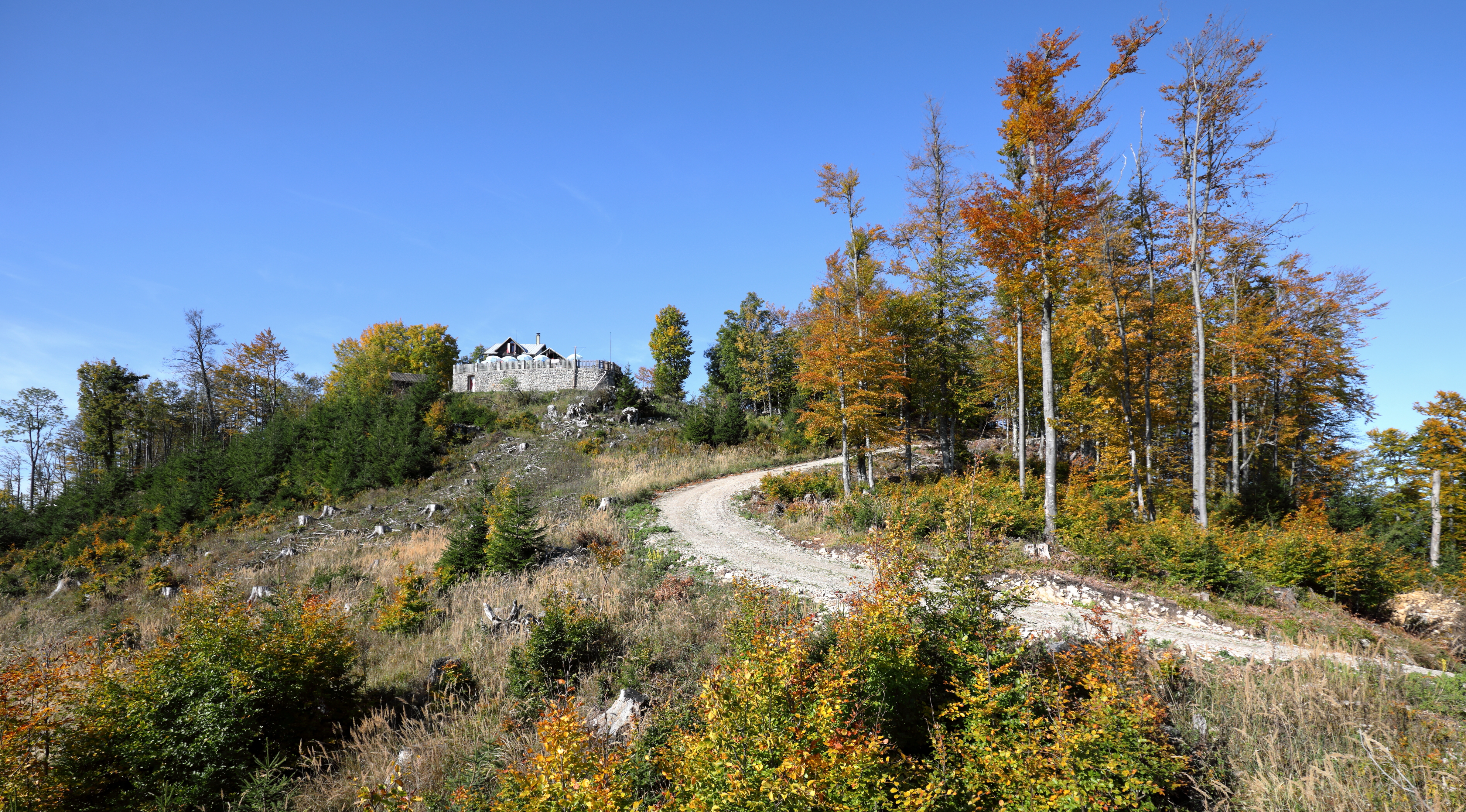 Ostansicht des Gipfelbereiches des 1195 m hohen Hohensteins mit dem Otto-Kandler-Haus.